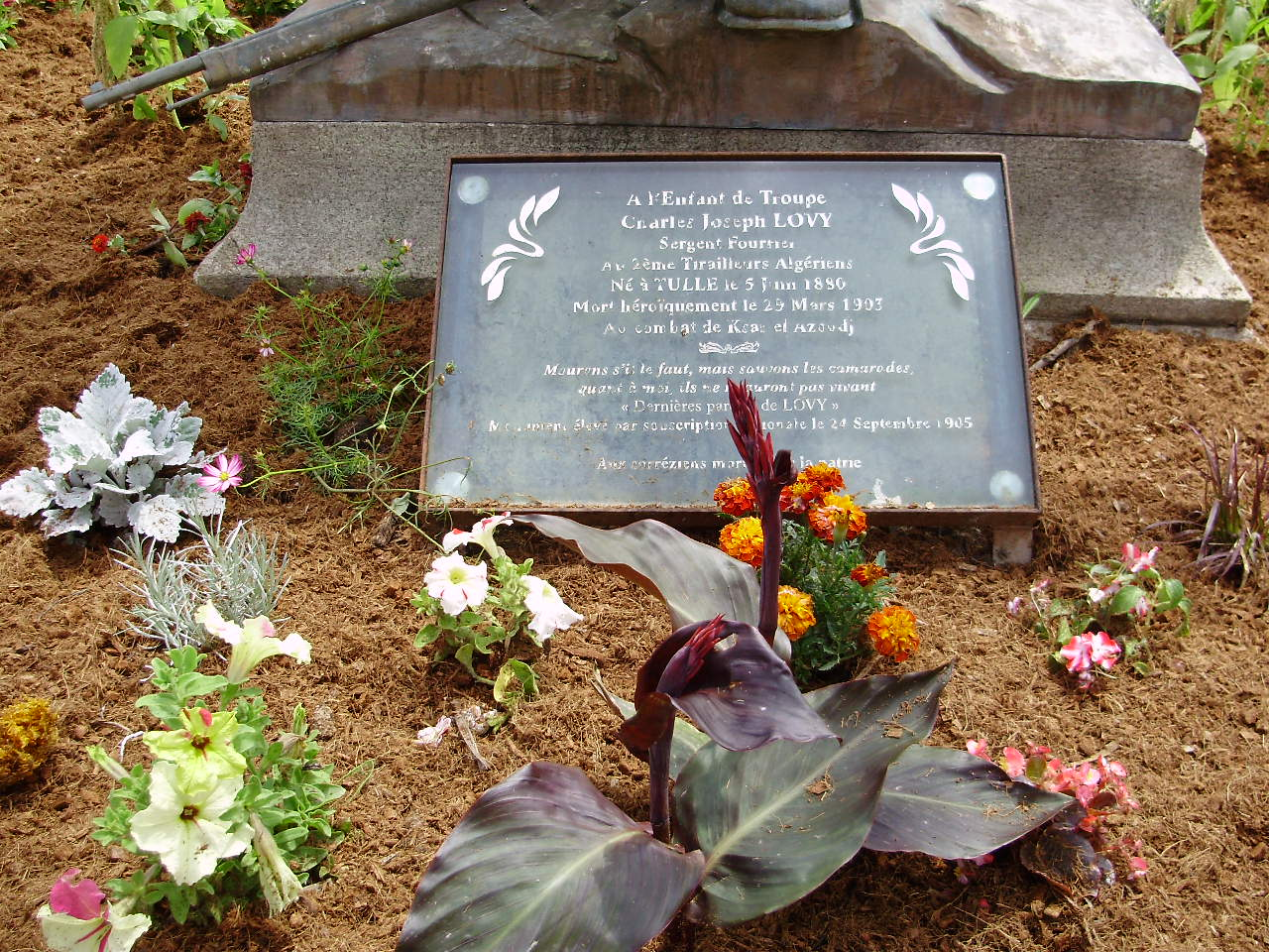 Il s'agit de la plaque apposée aux pieds du monument à la mémoire de Ch Lovy érigé à Tulle (Corrèze) créé par Constant Auguste Thomsen, sculpteur et qui reprend les anciennes inscriptions du socle aujourd'hui supprimé